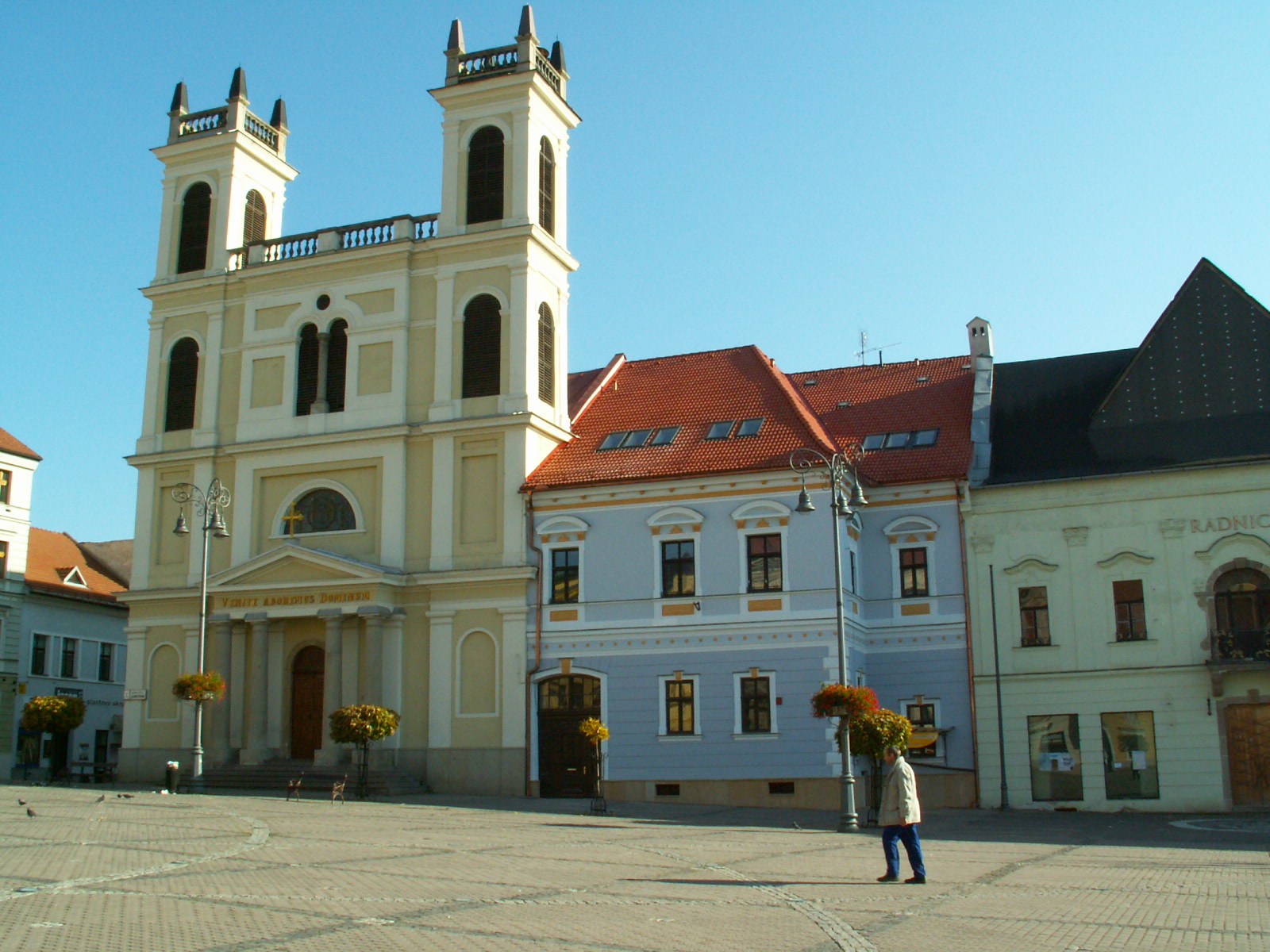 Námestie SNP - rímskokatolícky kostol sv. Františka Xaverského